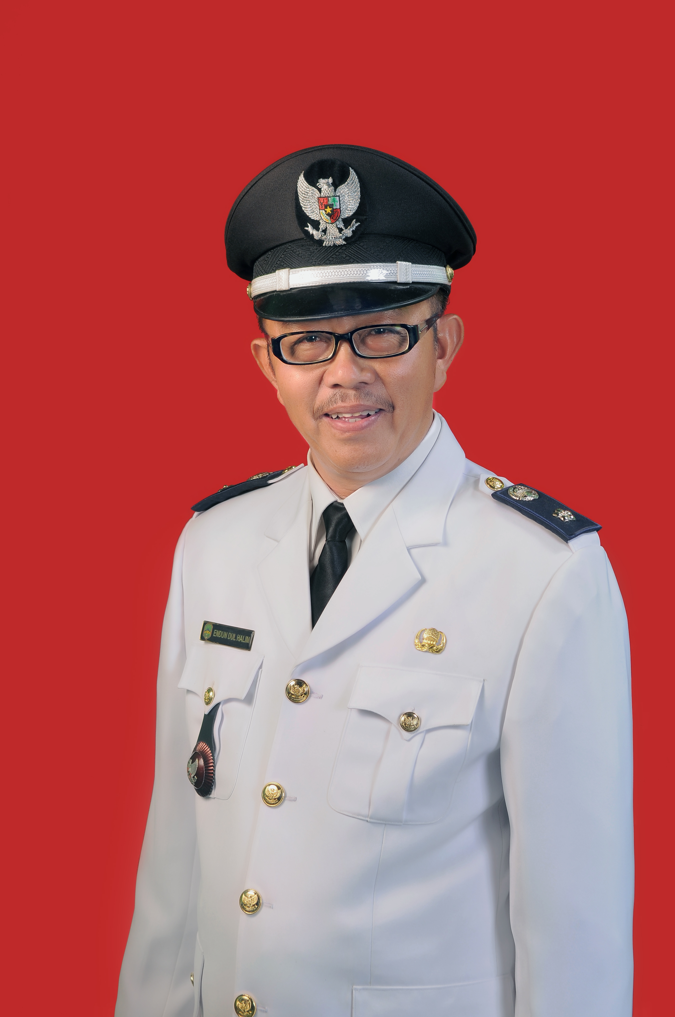 BAPAK ENDUN DULHALIM 2015-2021